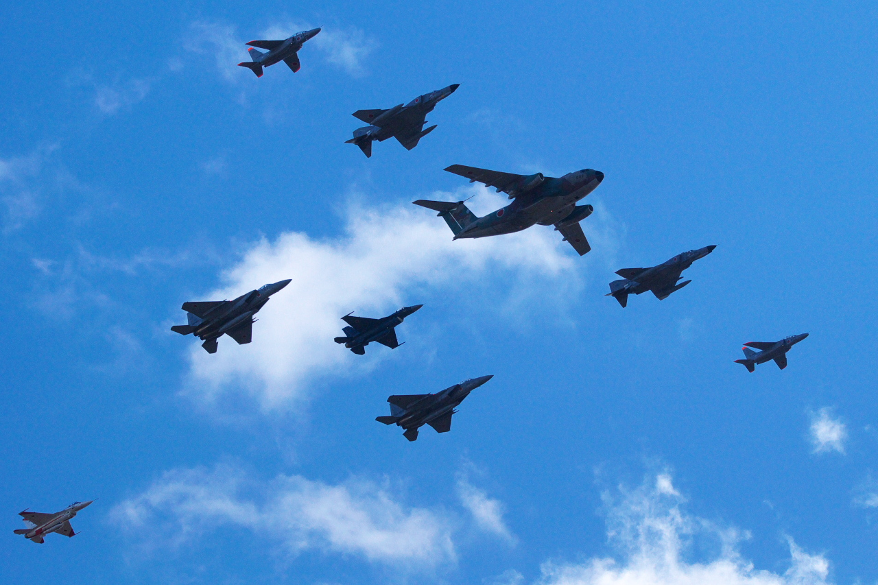 2008年11月30日、岐阜県の岐阜航空基地での航空祭より。異機種大編隊の航過2回目。1回目とは隊形が変わっています。